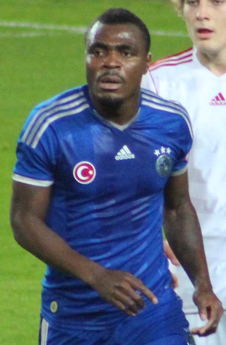 Emenike & Caglar Soyuncu @ Fenerbahce - Altinordu 23 December 2014